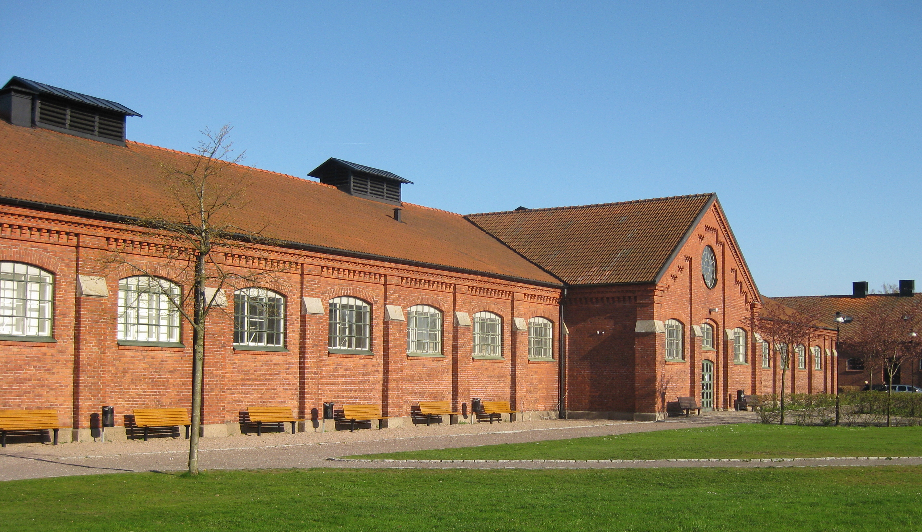 Regementsbyggnad i Ystad. Ursprungligen stallar, numera biograf.